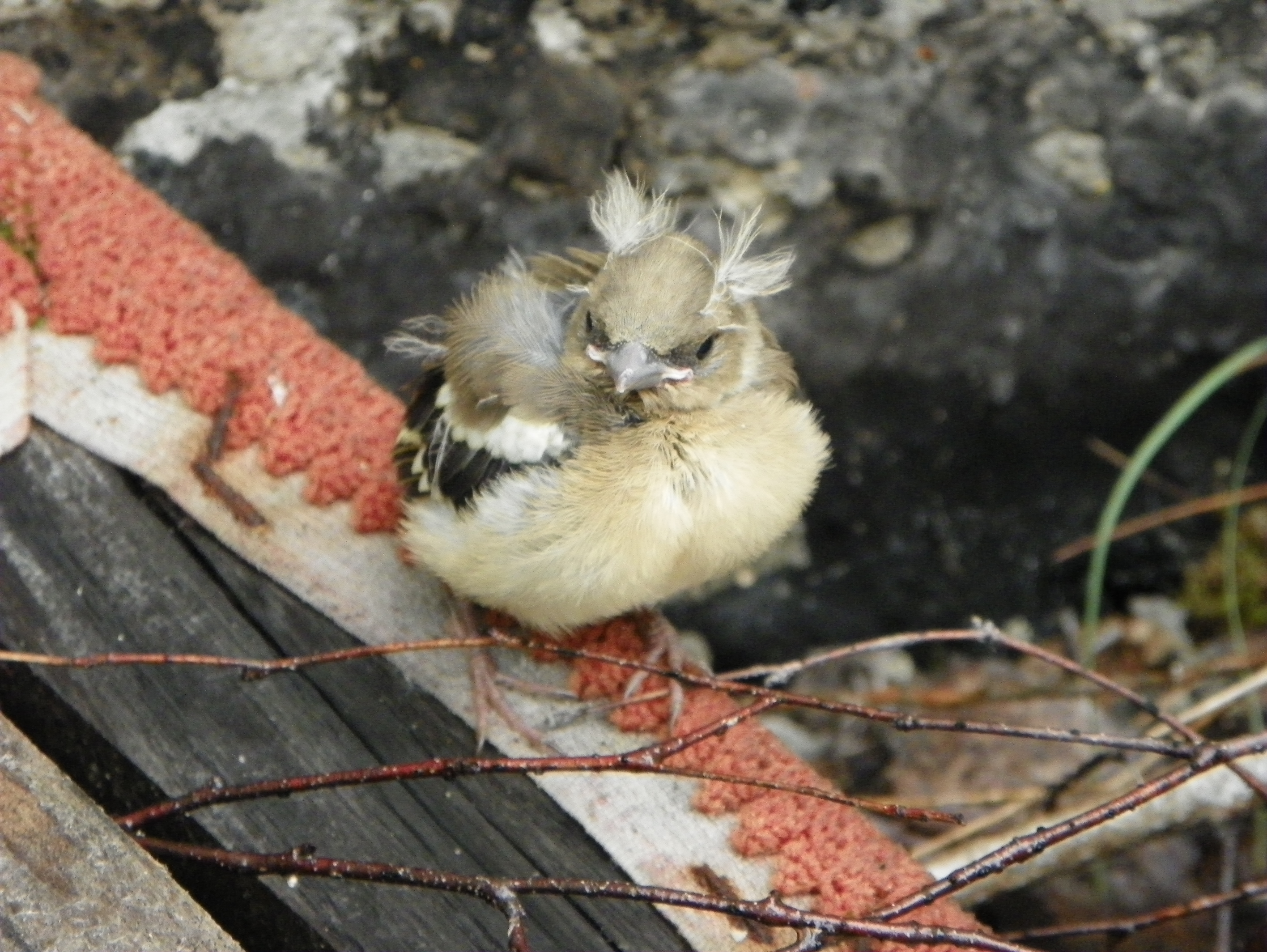 Місто Прип'ять Чорнобильської зони